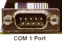 חיבור של COM המחשב חיבור קלאסי של COM תמונה די ישנה סליחה על כך !